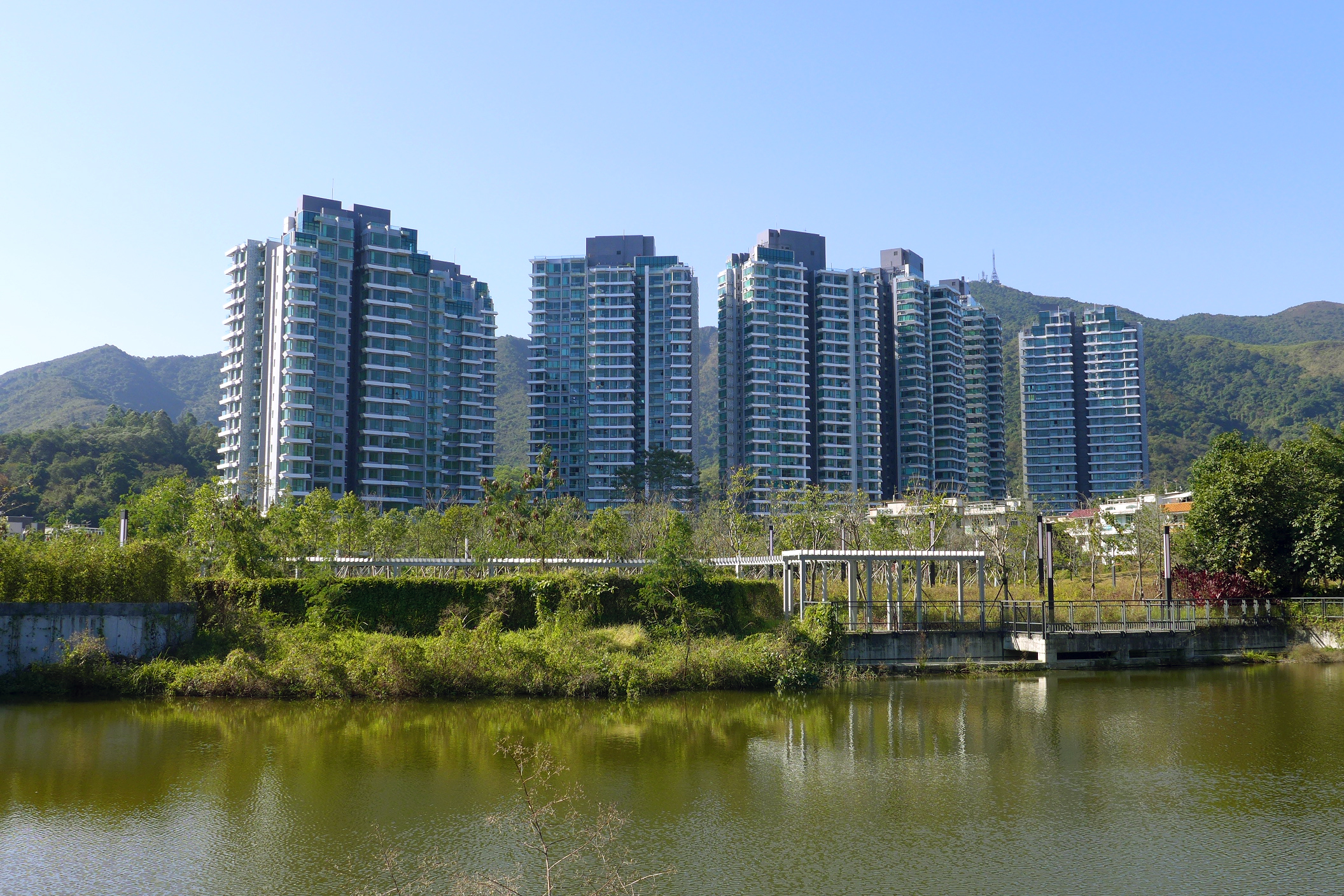 Mont Vert, Tai Po